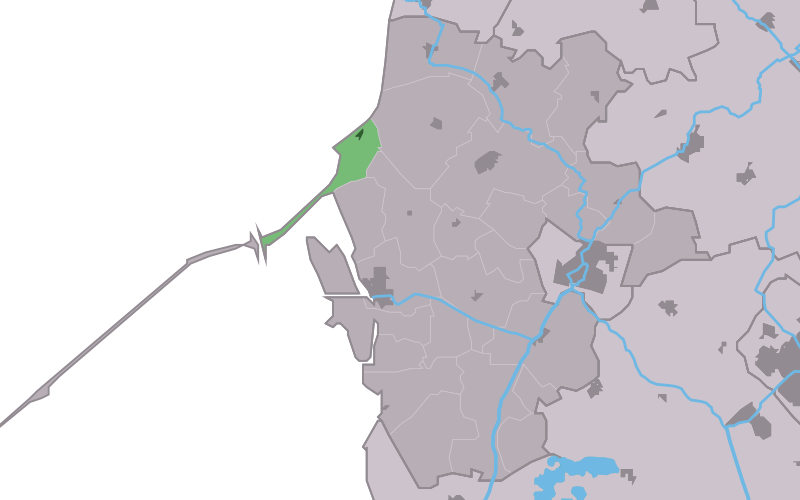 Kaartsje fan himrik fan Surch